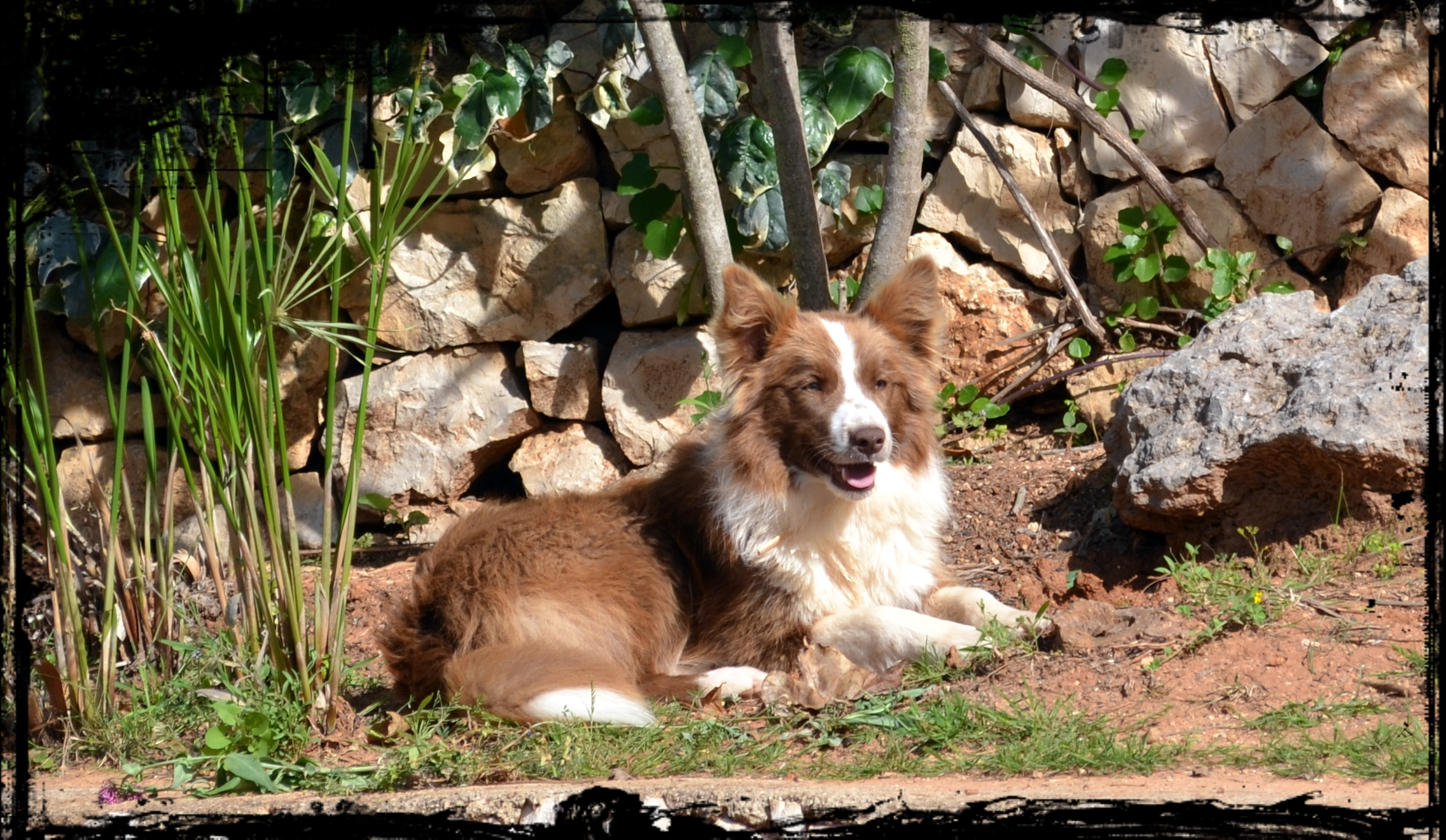 Border Collie Hembra Chocolate